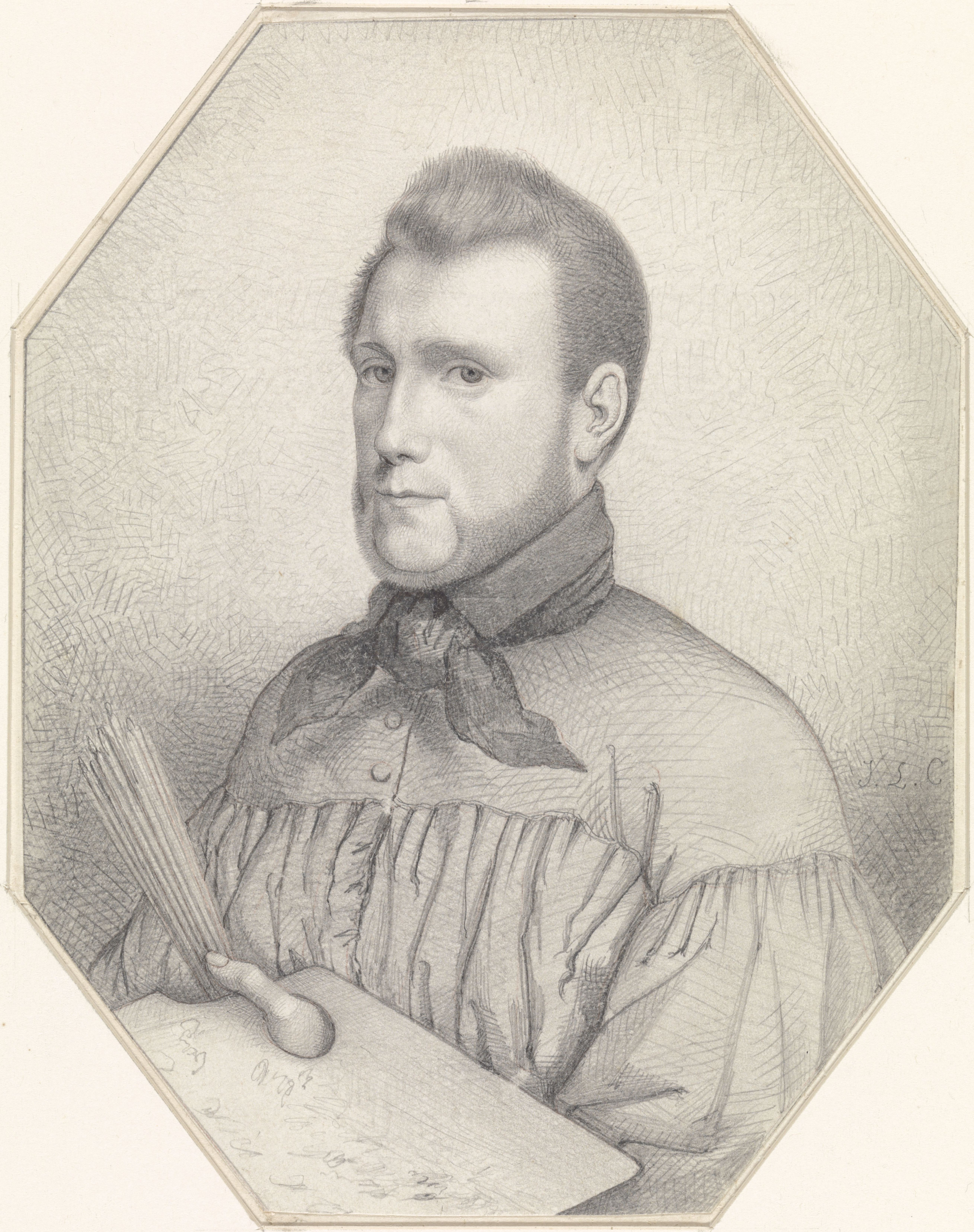 Zelfportret van Jacobus Ludovicus Cornet, Jacobus Ludovicus Cornet, 1835 - 1855.